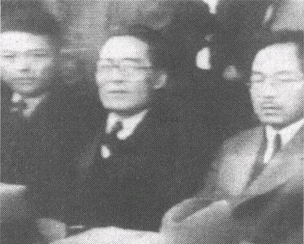 1946년 3월, 제1차 미-소 공동위원회 환영 시민대회 집회에서. 한국의 정치가 김원봉,허헌,박헌영 (왼쪽순)